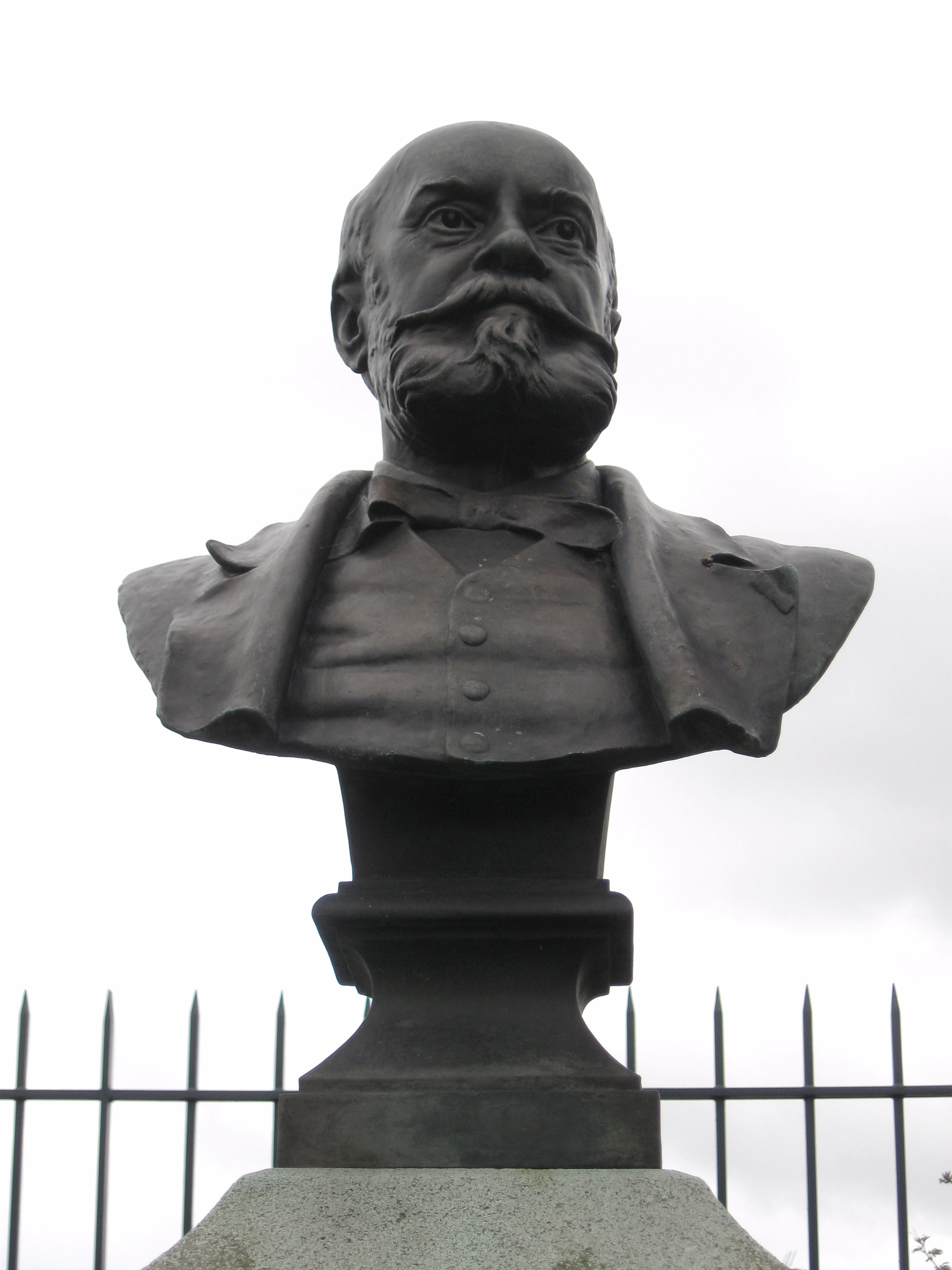 Buste de Théodore Aubanel (1829-1886) dans le Jardin des Félibres, Sceaux, Hauts-de-Seine, France